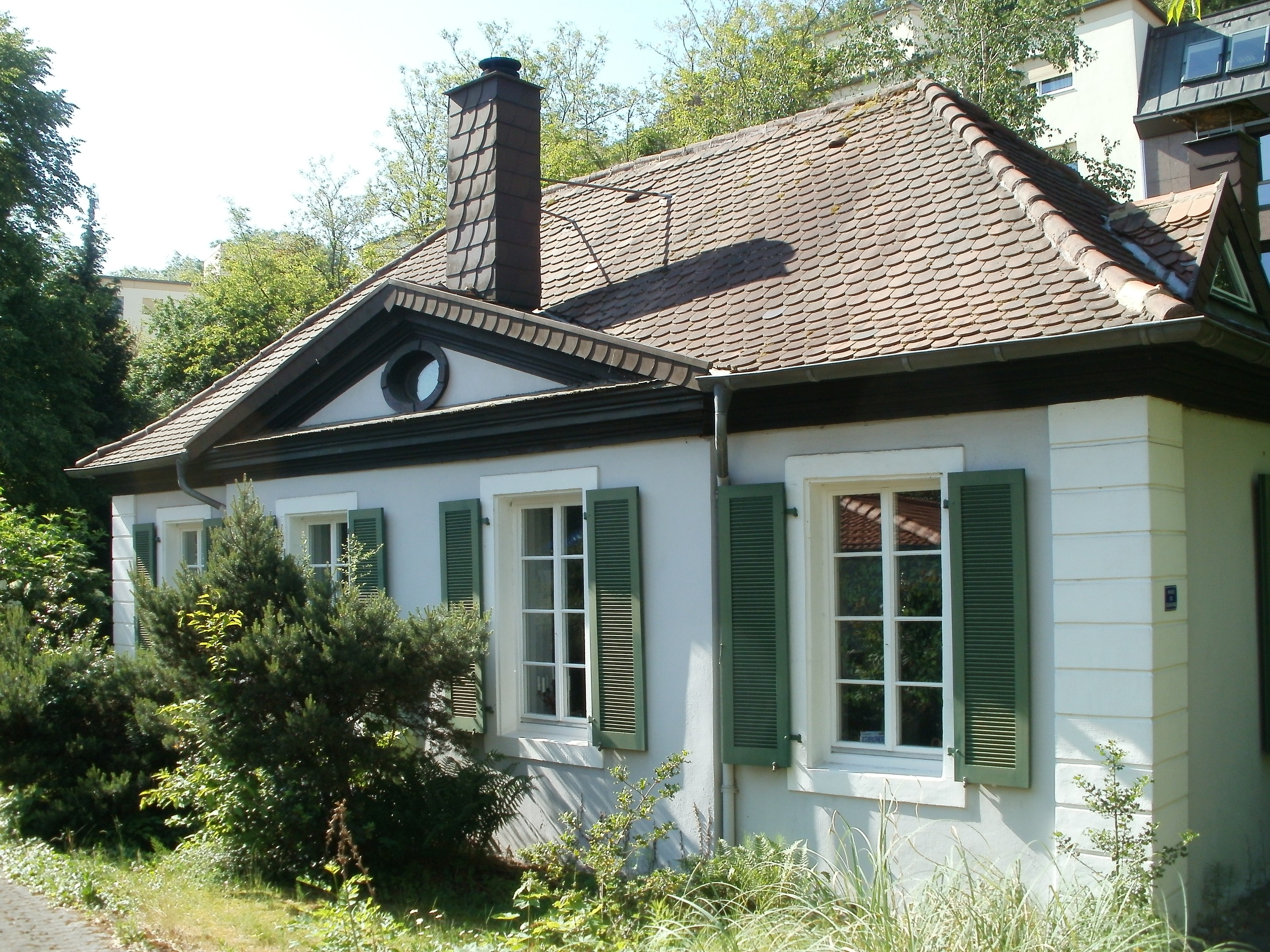 Puccinistraße 2a (Sankt Arnual)